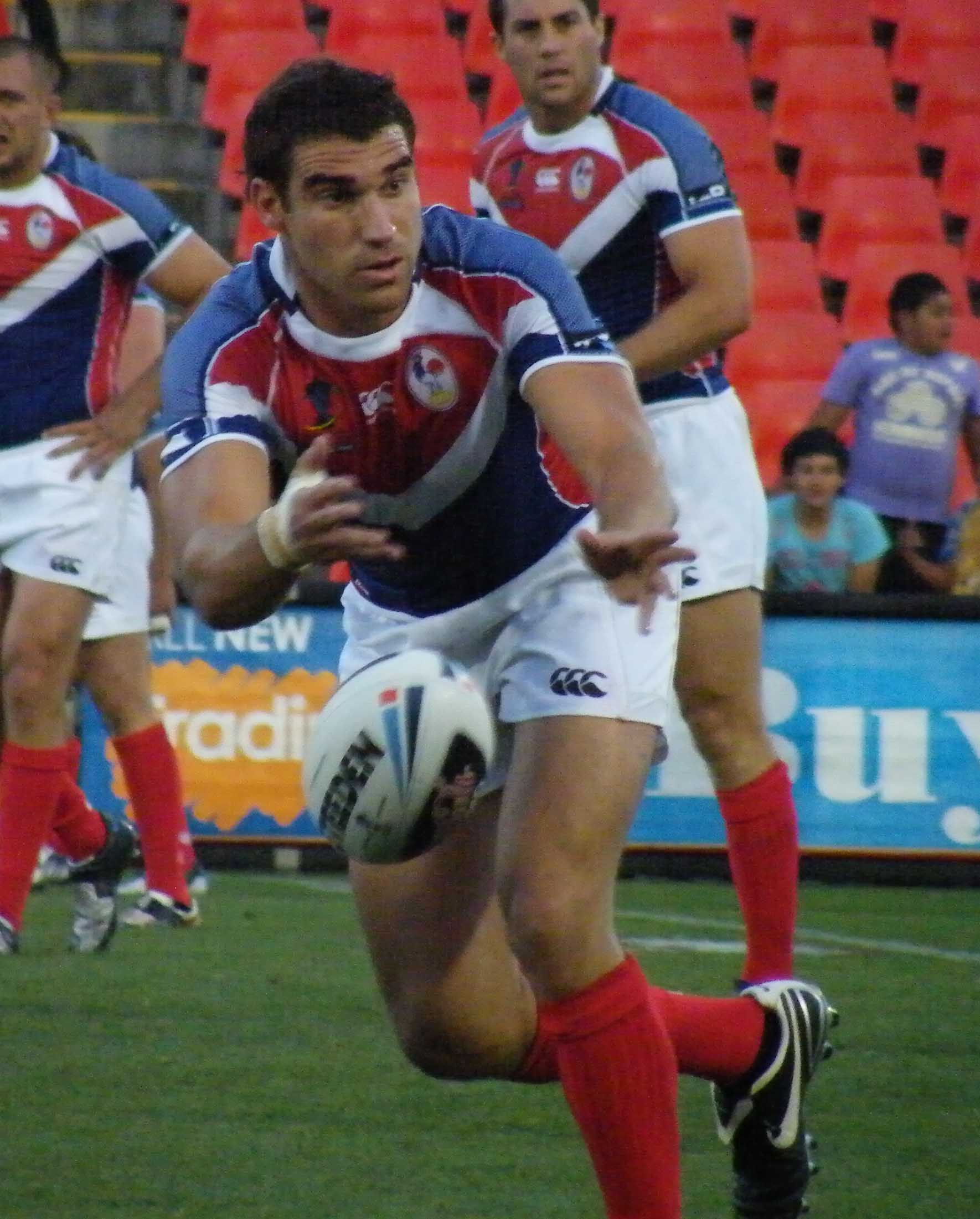 Joueur de rugby à XIII Thomas Bosc sous le maillot de l'équipe de France.